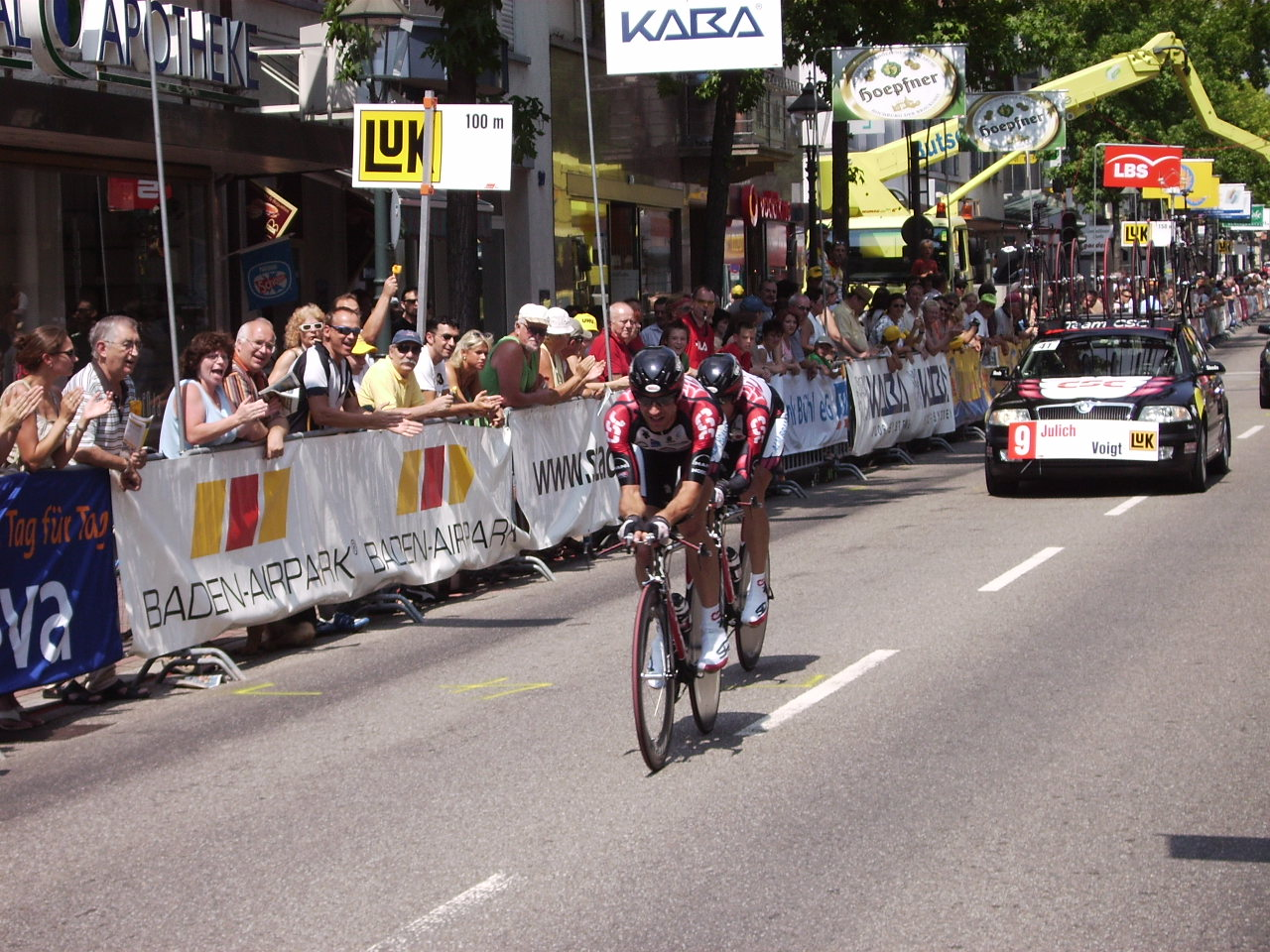 Jens Voigt beim Paarzeitfahren in Bühl/Baden am 29.Juli 2006.